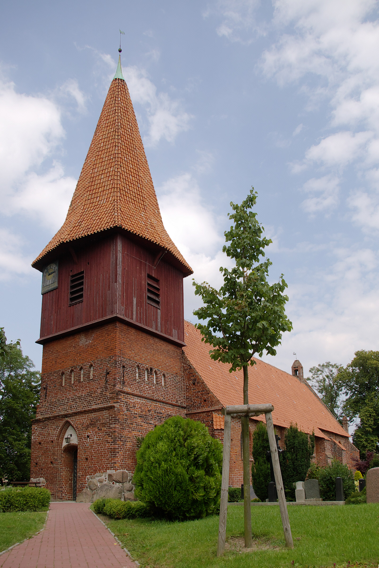 St. Nikolai-Kirche Altefähr, Rügen. Ansicht aus südwestlicher Richtung